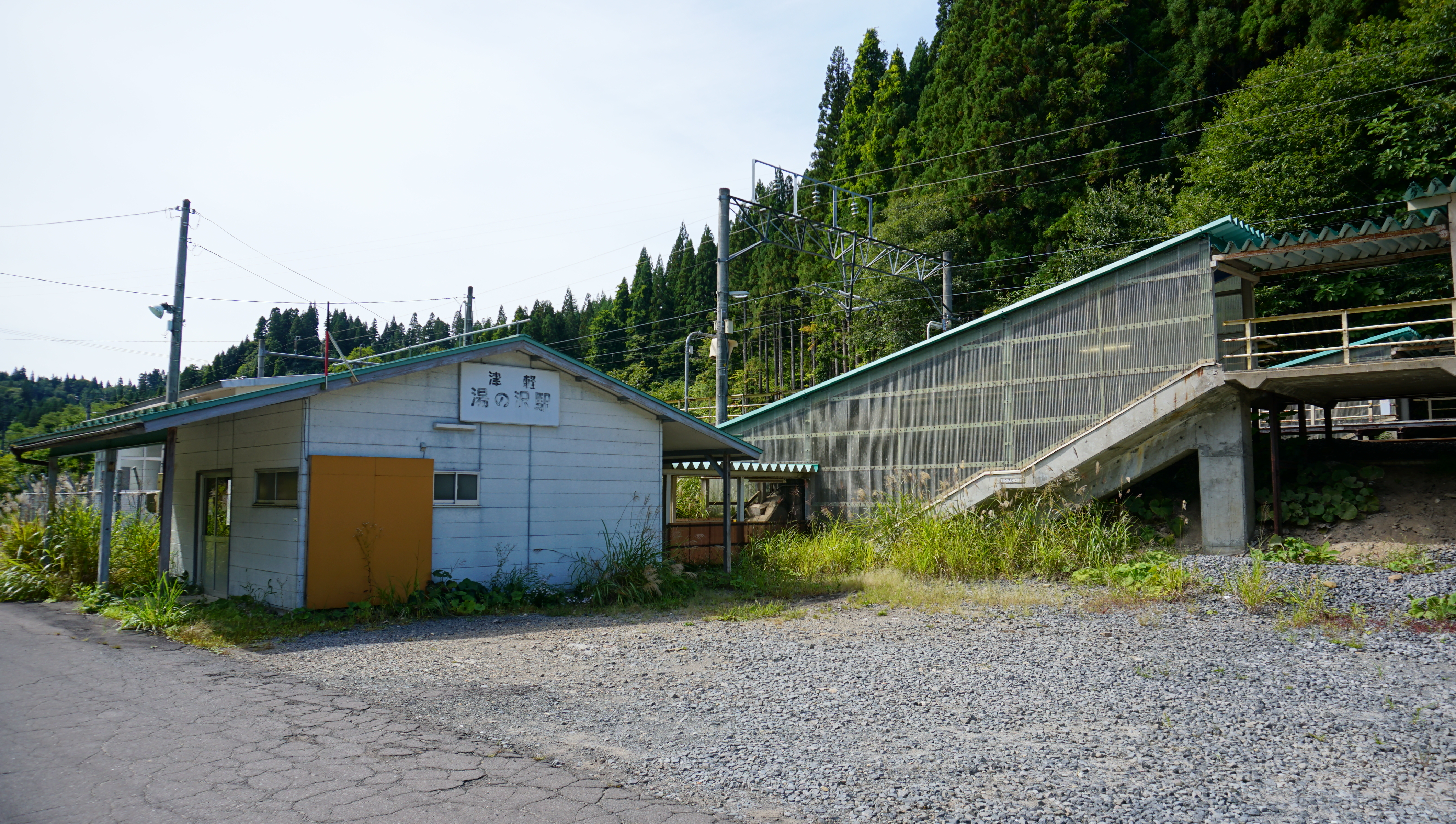 奥羽本線 津軽湯の沢駅（青森県平川市）